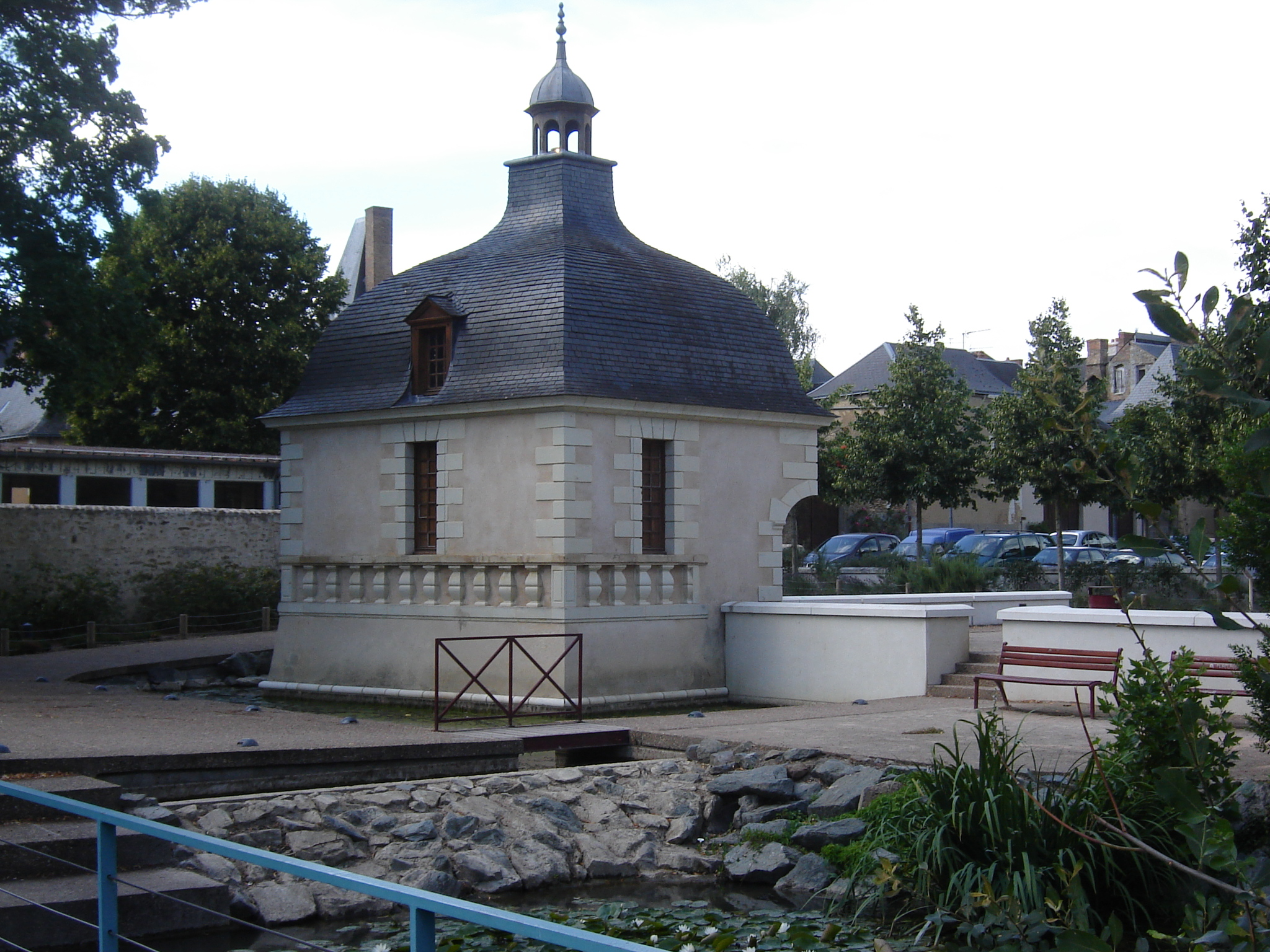 Photo du Pavillon Fouquet de La Varenne à La Flèche